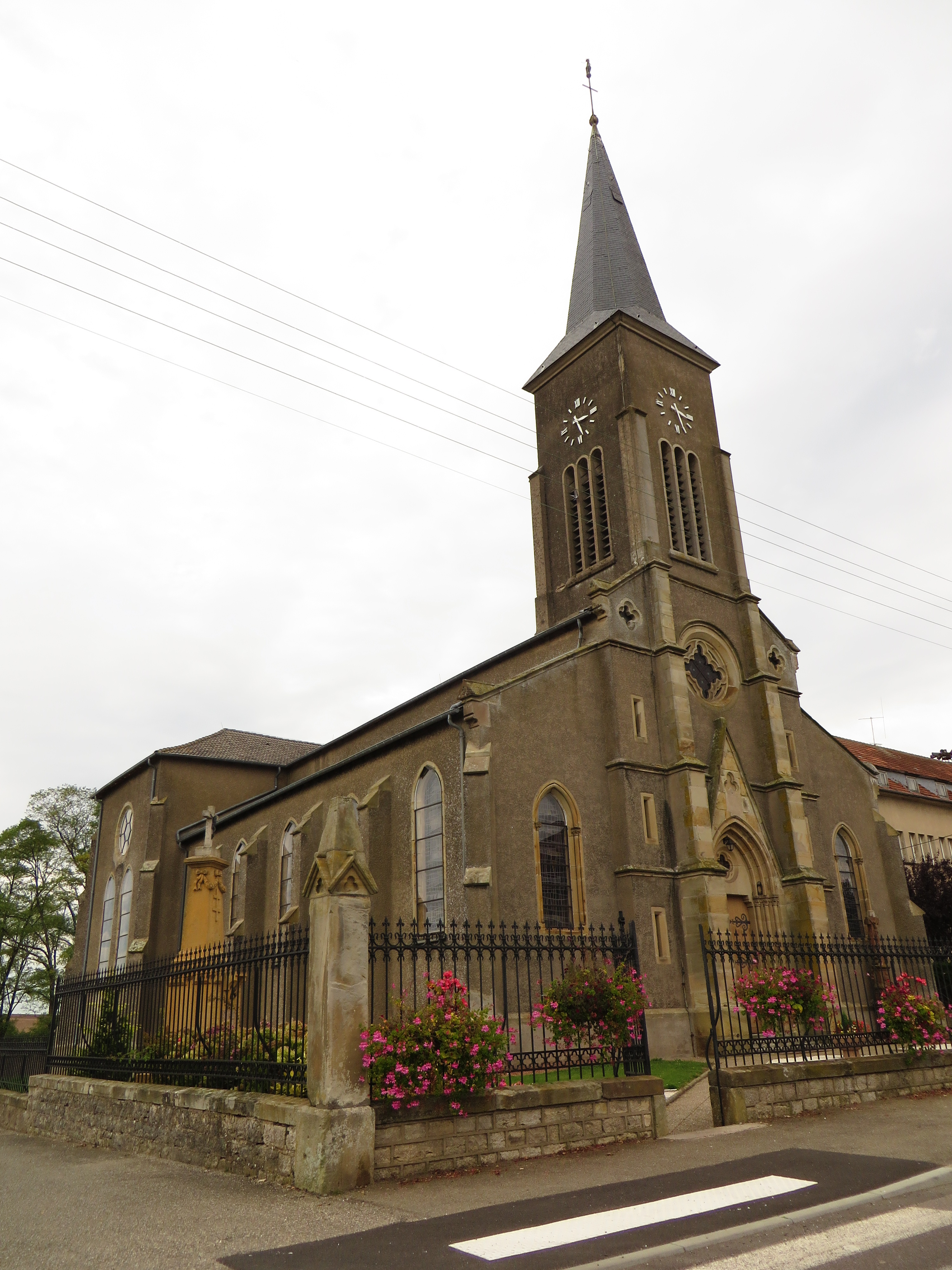 Grostenquin eglise